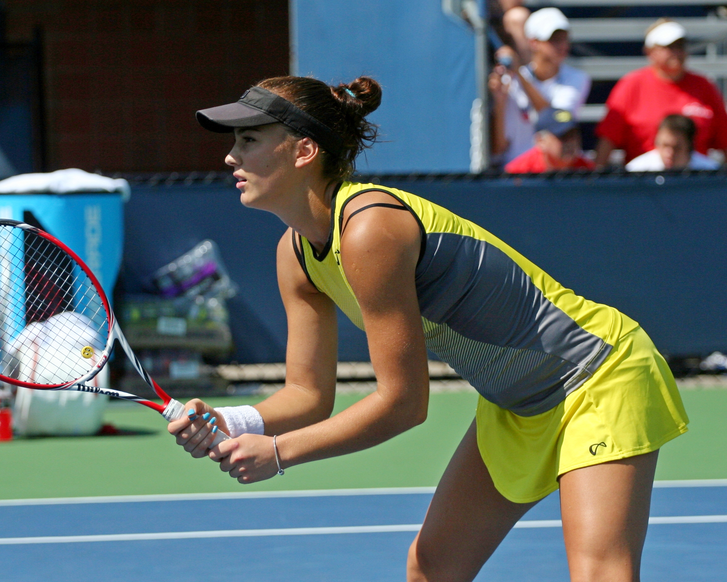 U.S. Open Wednesday, Aug. 27, 2014